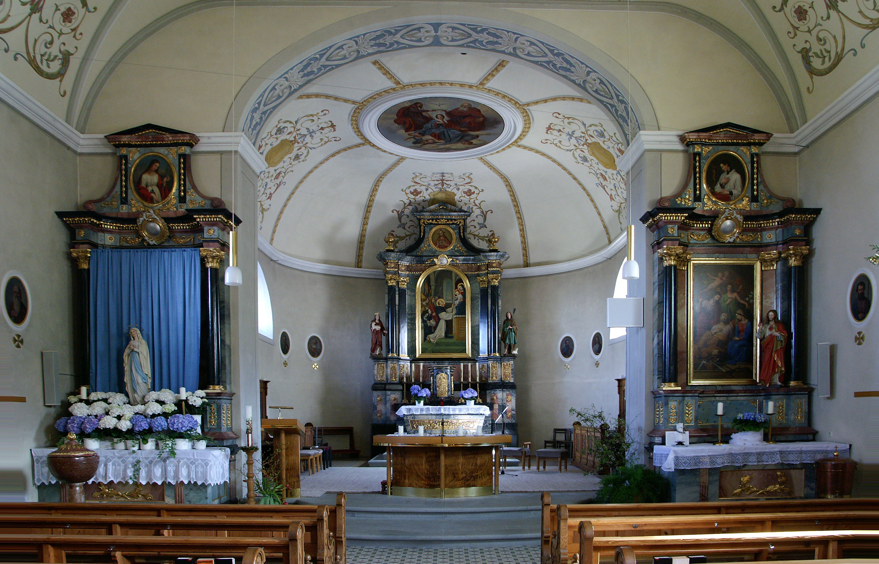 Hochalter und Seitenaltäre der Pfarrkirche St. Bernhard vom Eichenberg in Vorarlberg.